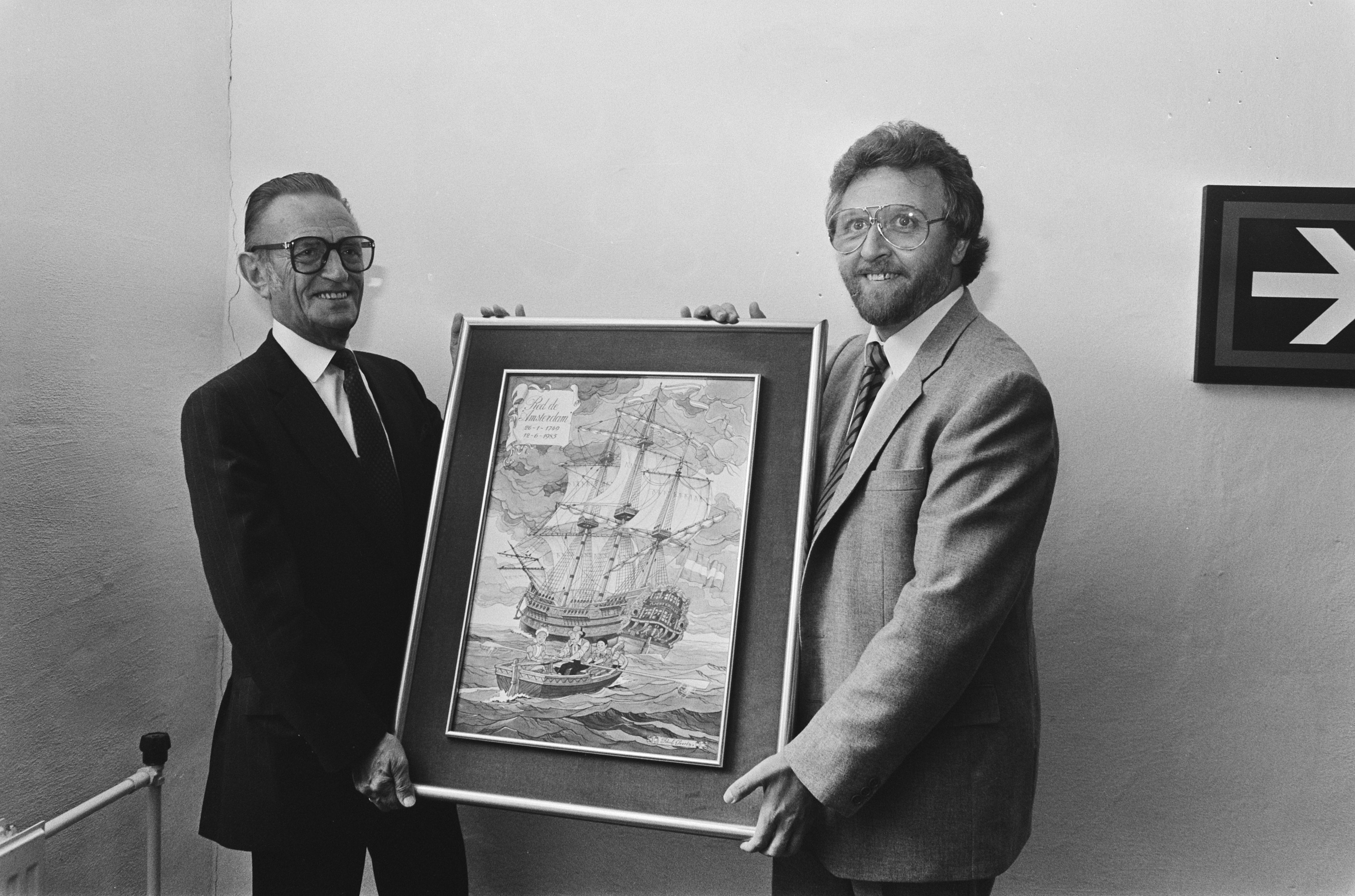 Willy Vandersteen (links) en Paul Geerts met poster "Angst op de Amsterdam" bij persconferentie Stichting VOC schip "Amsterdam" Datum:12 juni 1985